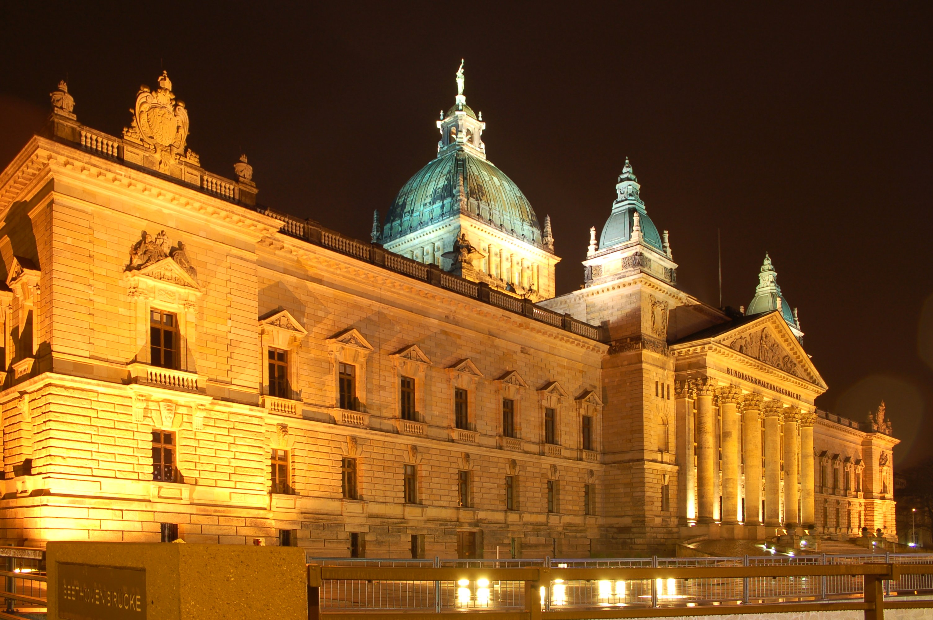 Bundesverwaltungsgericht Leipzig